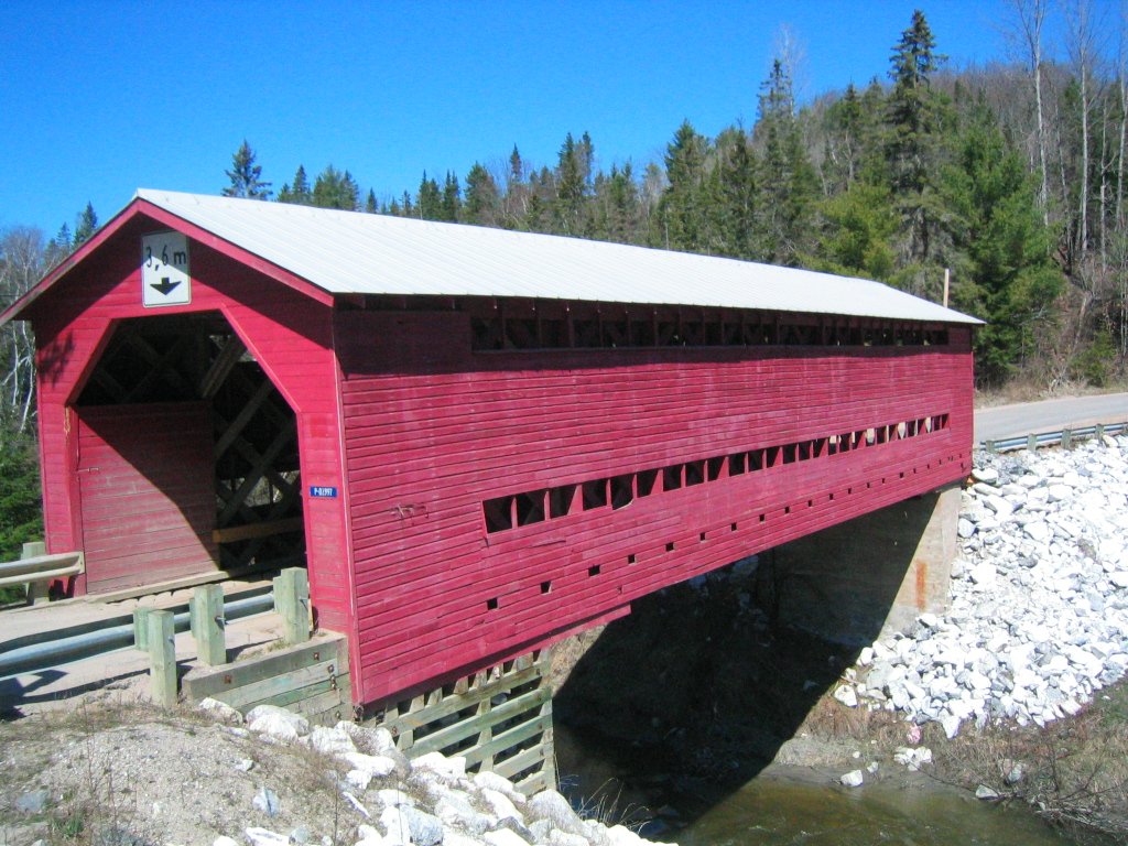 Pont Kelly à Low, au Québec. Il aurait été construit en 1923, et a été détruit dans un incendie criminel le 19 janvier 2019.